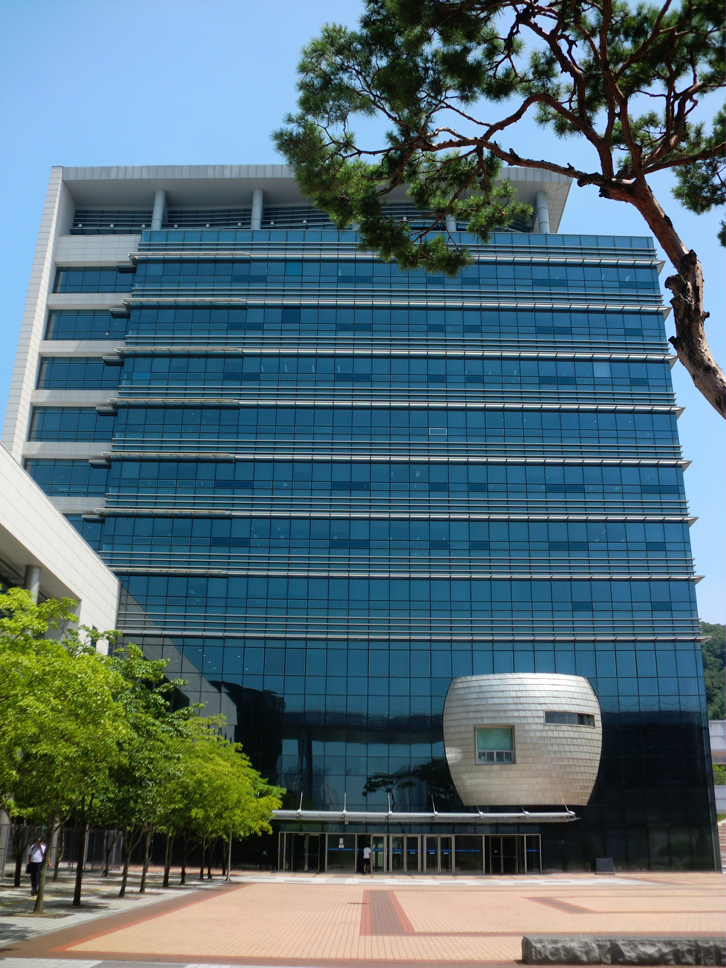 충청남도 천안시에 있는 천안시청